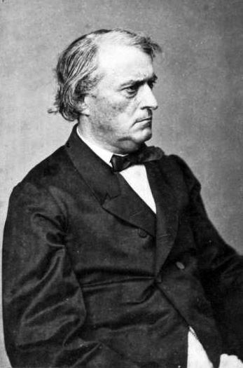 Pierre Soulé (1801-1870), carte de visite